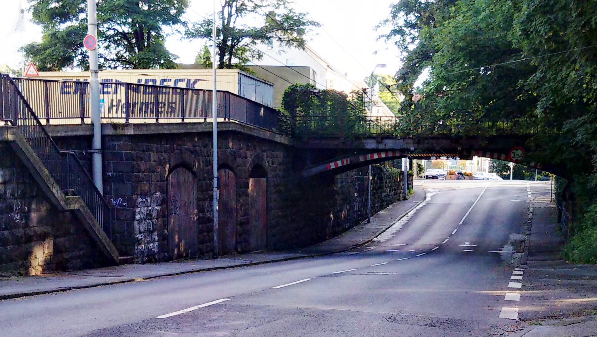 Unterführung Bahnhof Solingen-Wald, Focher Straße, aufgenommen im Sommer 2016